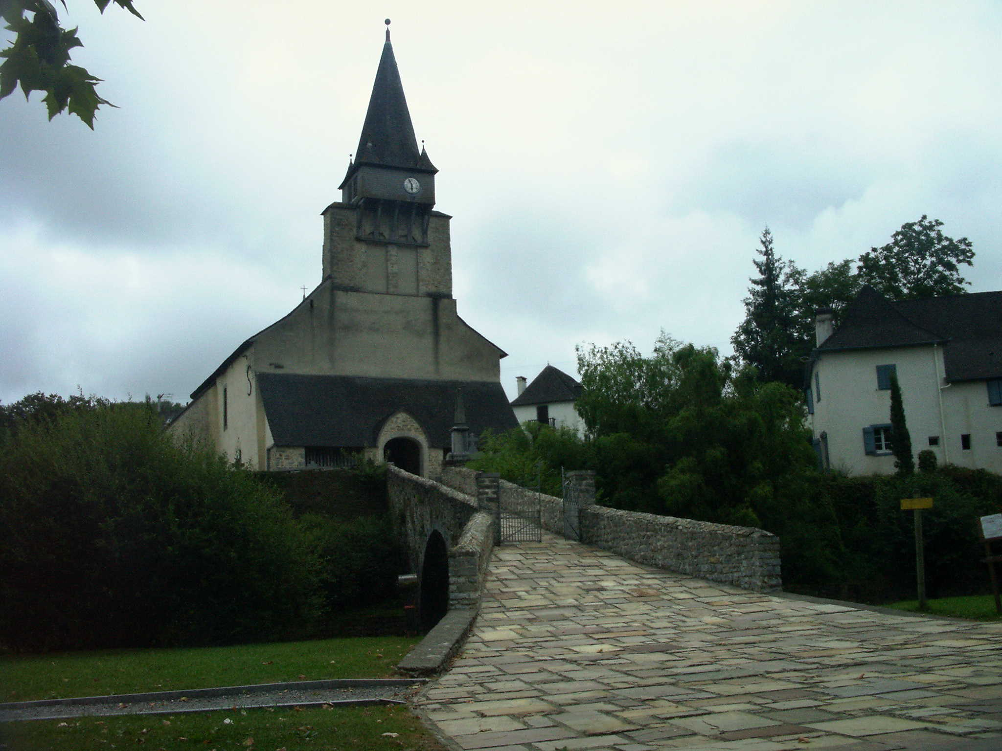 Urdiñarbeko eliza